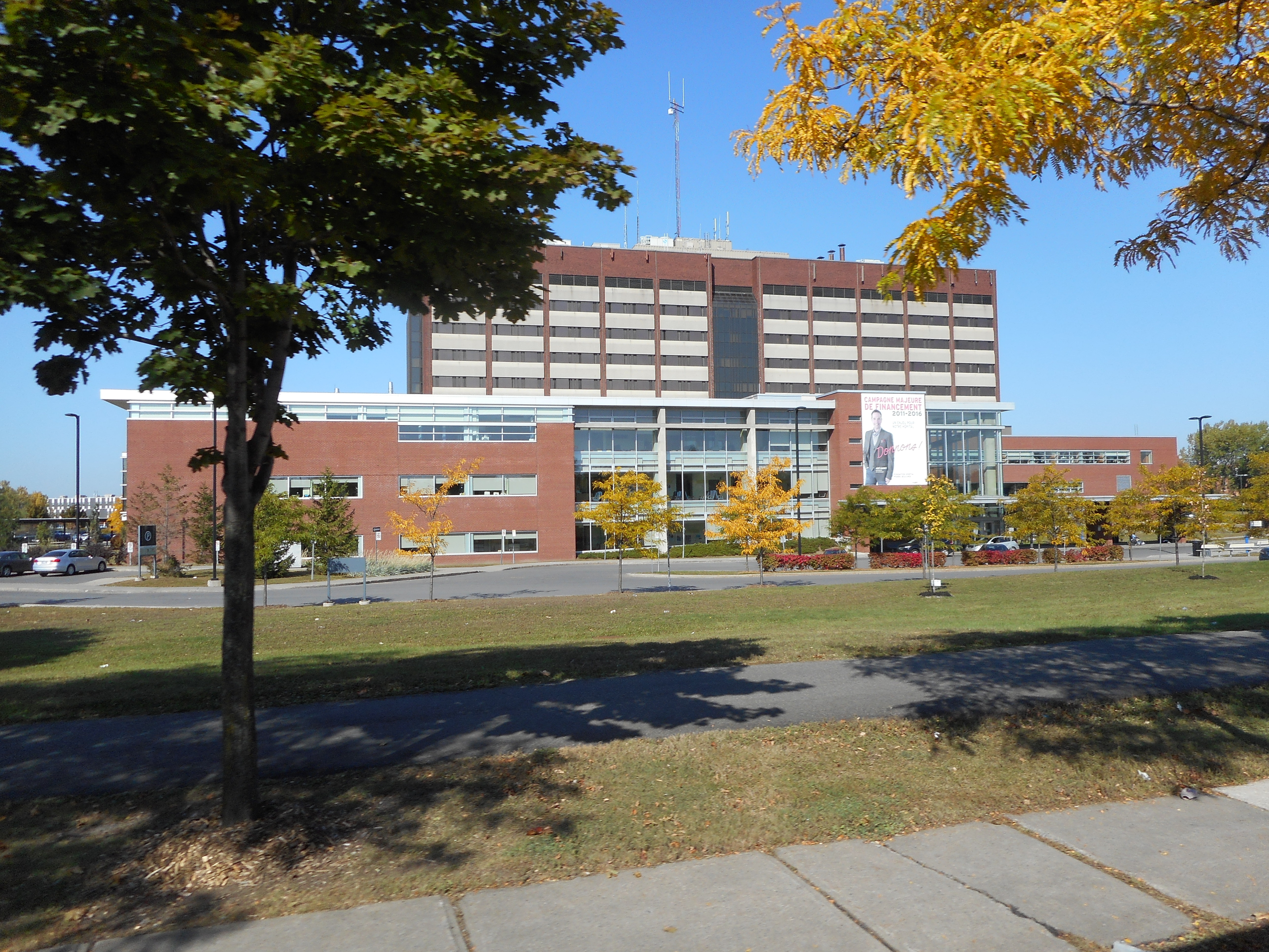 L'hôpital Pierre Boucher est situé au 1333, boulevard Jacques-Cartier Est, à Longueuil.